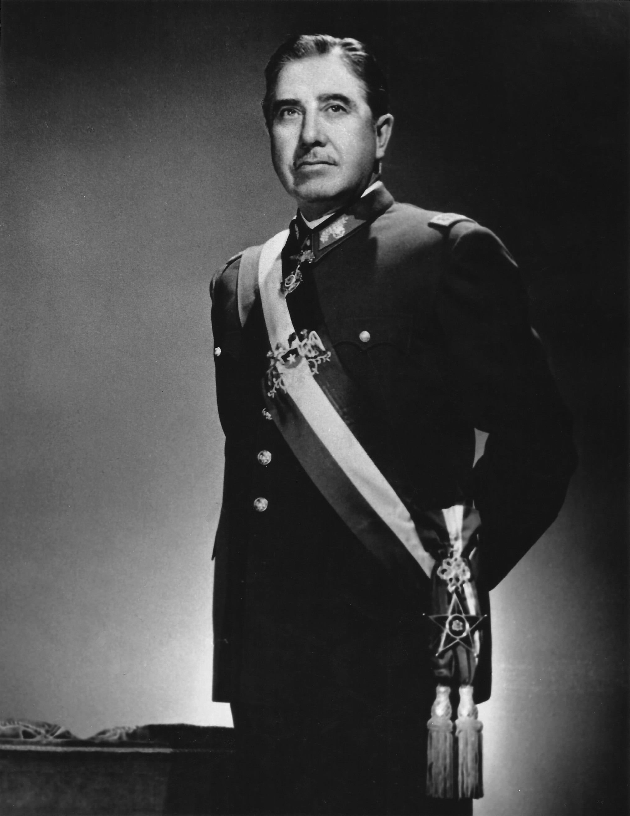 Augusto Pinochet Ugarte (c. 1974).